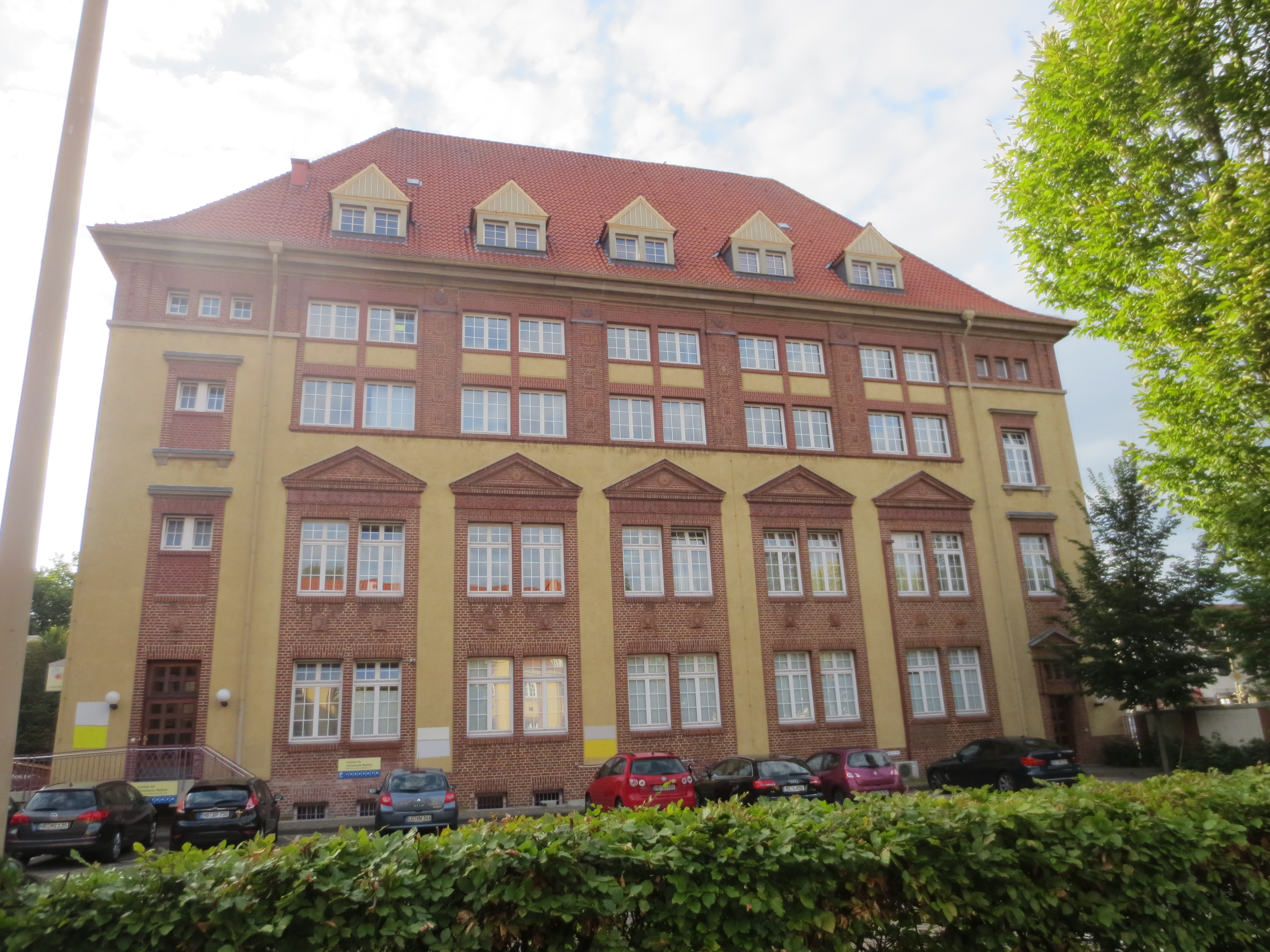 Fernsprechamt "Hansa", Hauptgebäude in Bremen, Friedrich-Karl-Straße 55Das abgebildete Objekt ist ein geschütztes Kulturdenkmal in der Freien Hansestadt Bremen, mit der Nr. 1755 beim Landesamt für Denkmalpflege registriert.